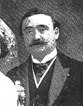 Pedro César Dominici en septiembre de 1913, por Kaulak.